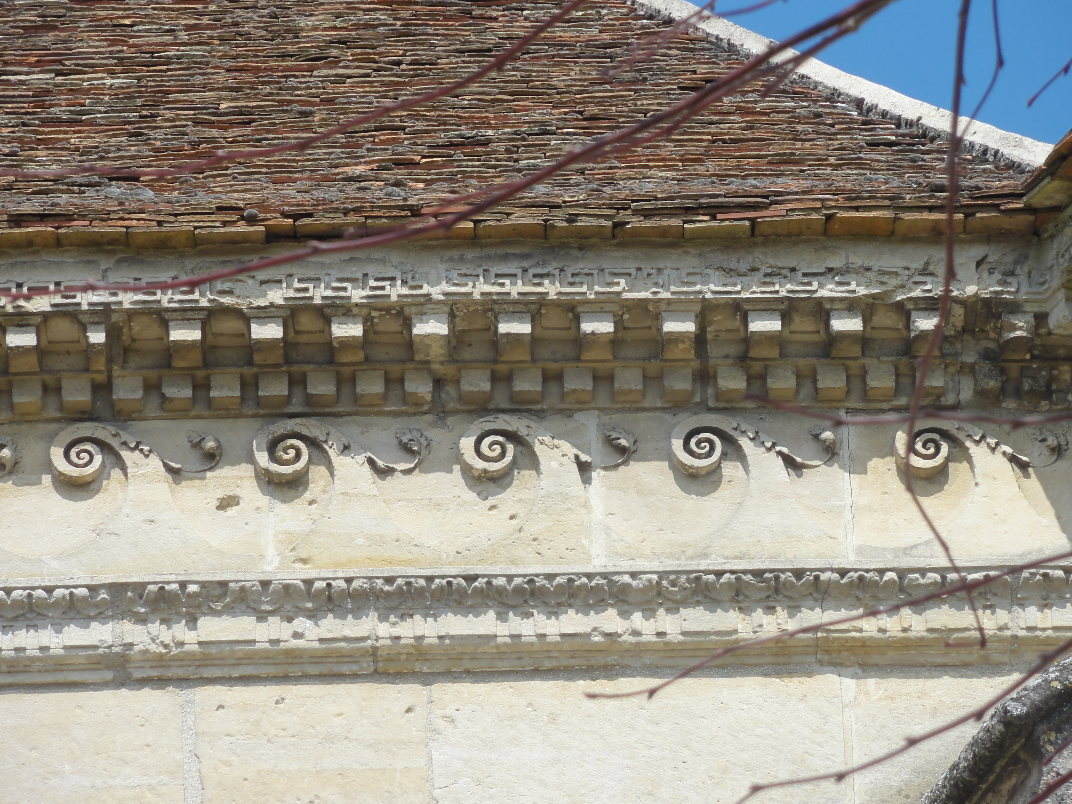 Église Notre-Dame-de-l'Assomption d'Auvers-sur-Oise - voir titre.